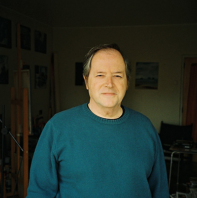 Retrato do Pintor Manuel Vilarinho